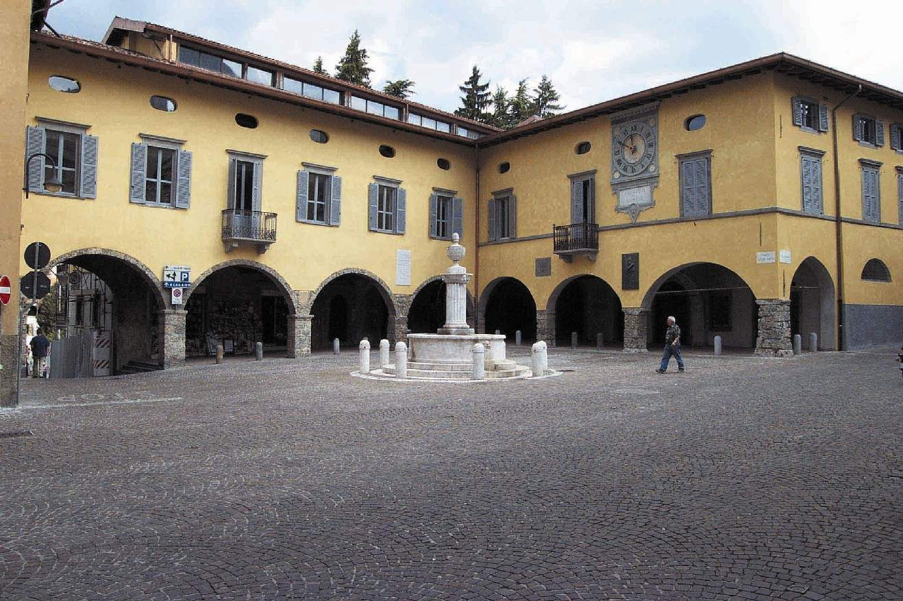 Gandino, piazza del Municipio.